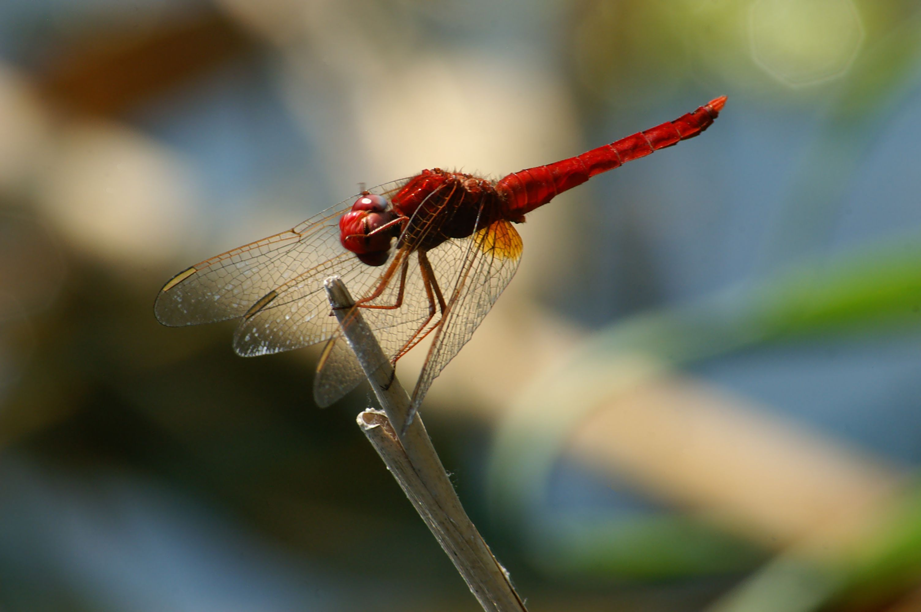 Feuerlibelle, gesehen in Kreta